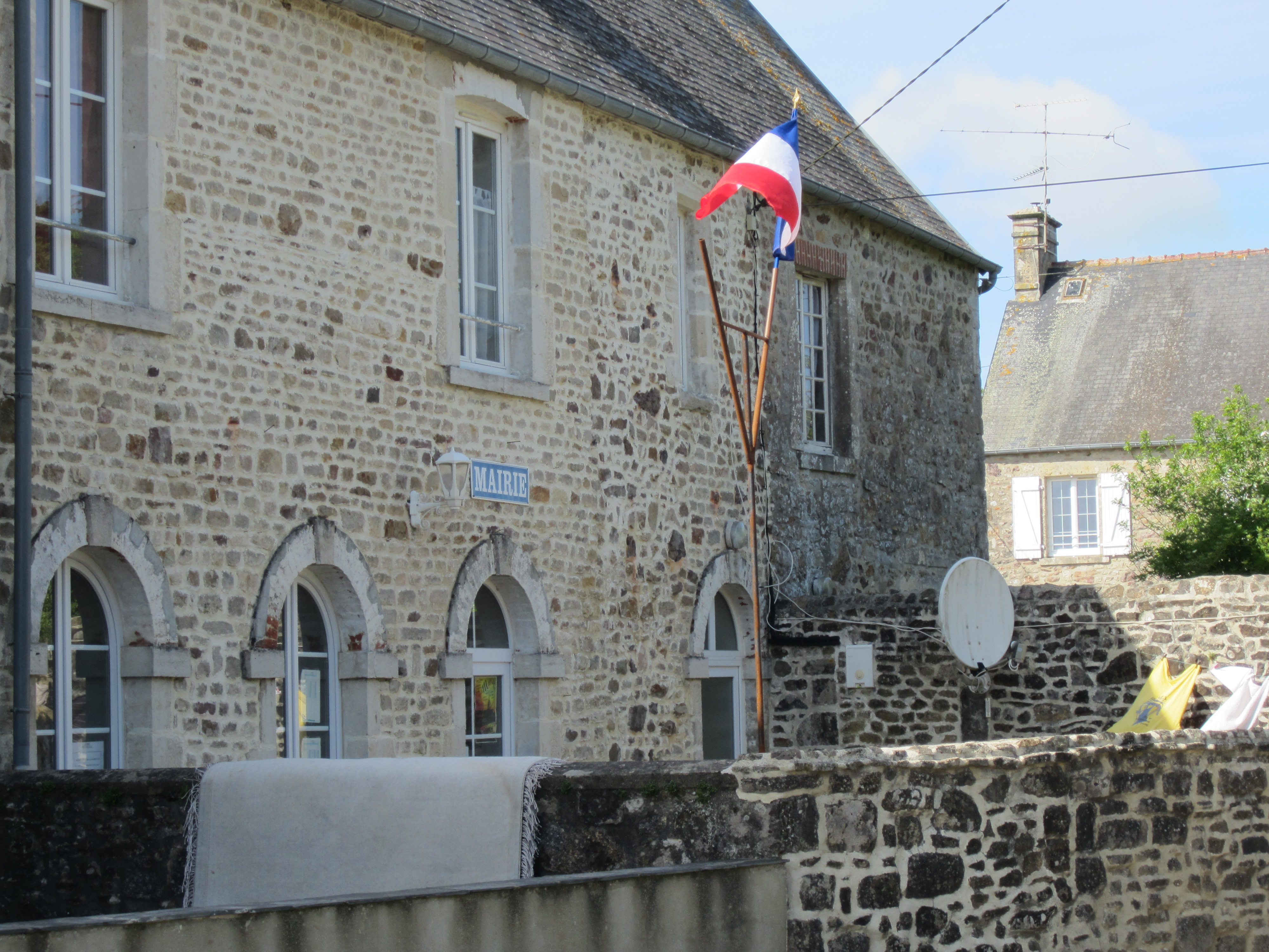 Mairie de Sortosville-Bocage